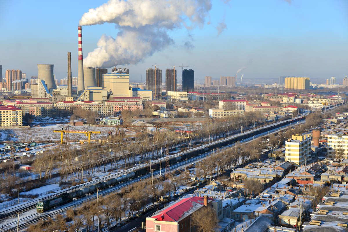 格兰云天小区看拉滨线